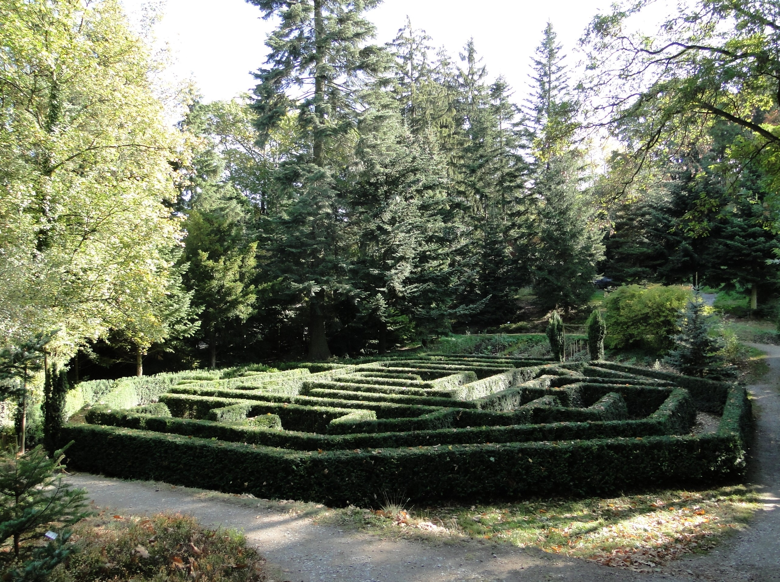 Forstbotanischer Garten, Tharandt, Labyrinth